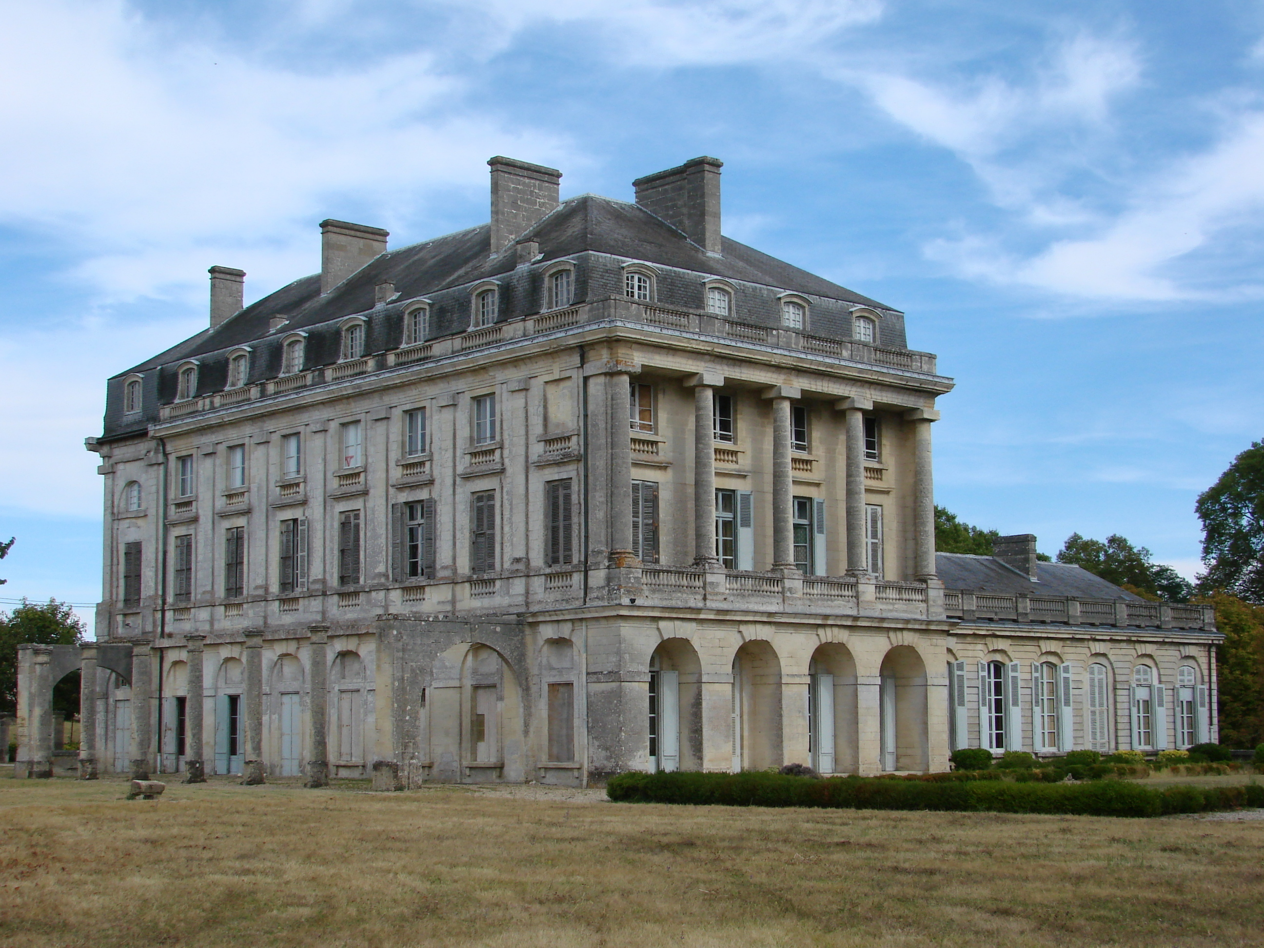 vue du corps de logis depuis le parc